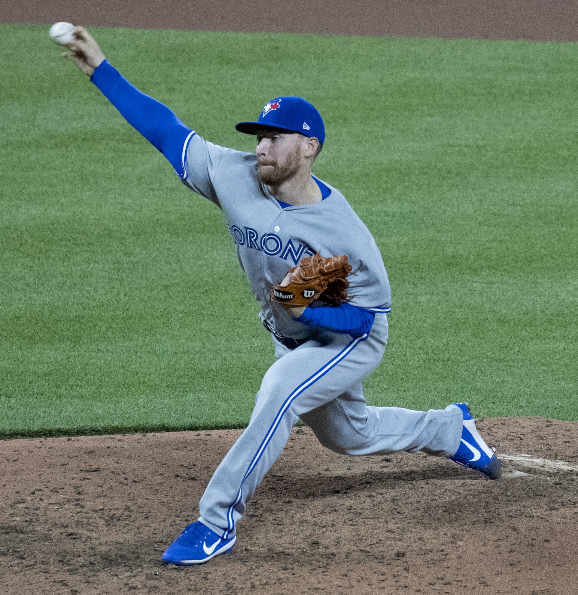 Blue Jays at Orioles 5/19/17